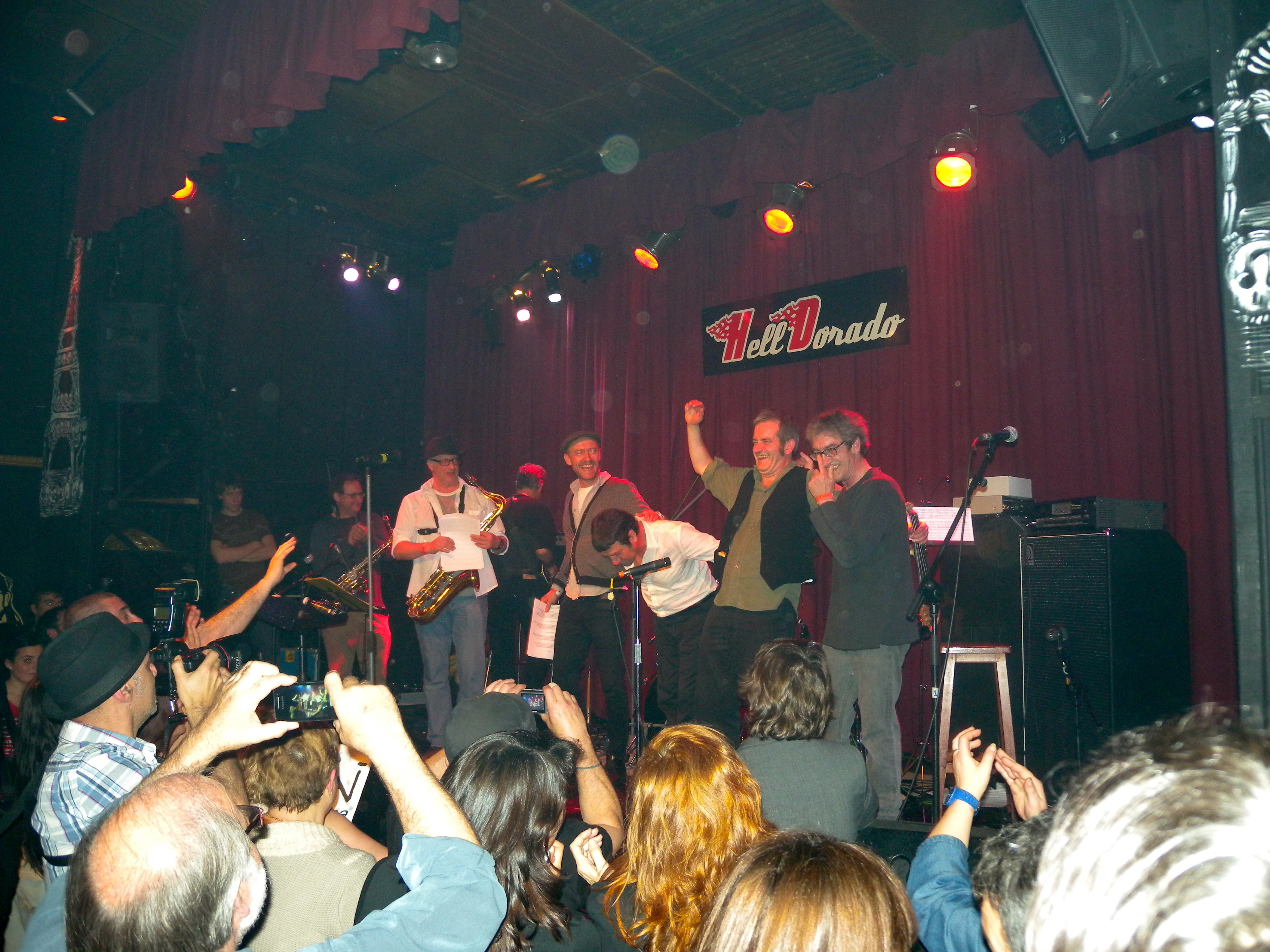 Hertzainak taldearen berragerpena, Gasteiz, 2012-4-28